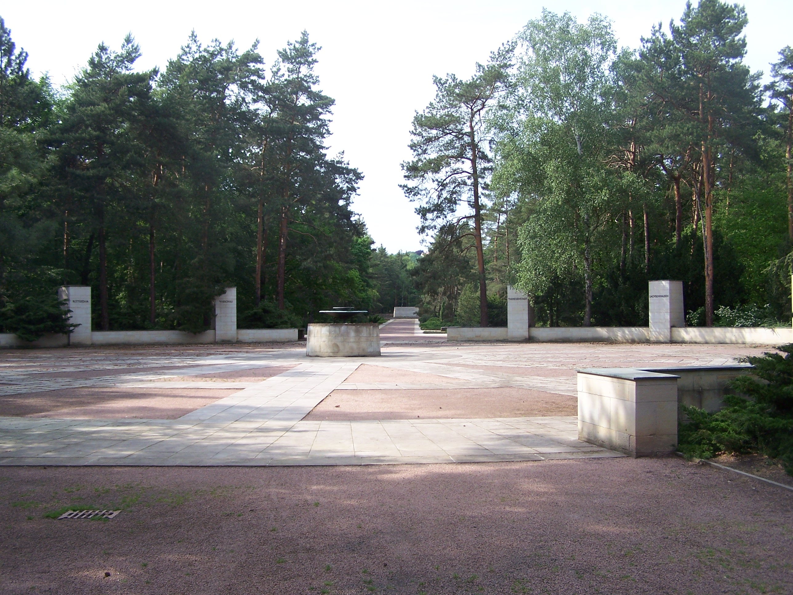 Rondell mit zentraler Opferschale und umgebenden 14 Sandsteinstelen, im Hintergrund die Sandsteinmauer (Heidefriedhof, Dresden)